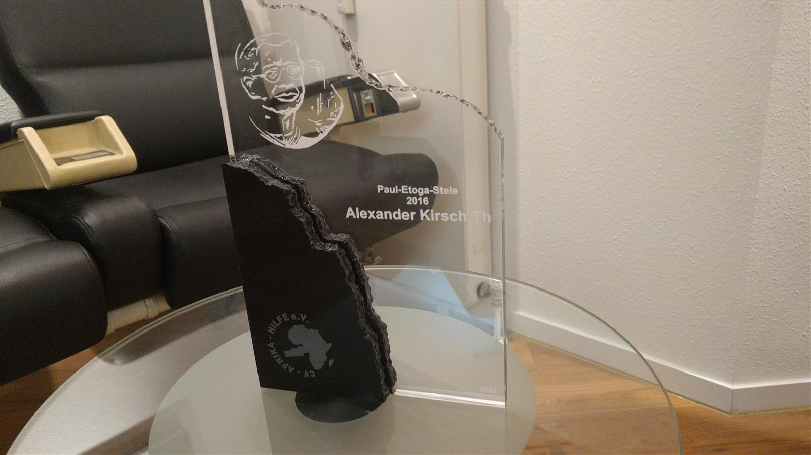 Paul-Etoga-Stele, Verleihnummer 2, verliehen in 2016 durch den Vorstand des CV-Afrika-Hilfe e.V. Designentwurf durch Dr. Andreas Neumann, genehmigt durch den Vorstand der CV-Afrika-Hilfe bei der ersten Sitzung in 2015.